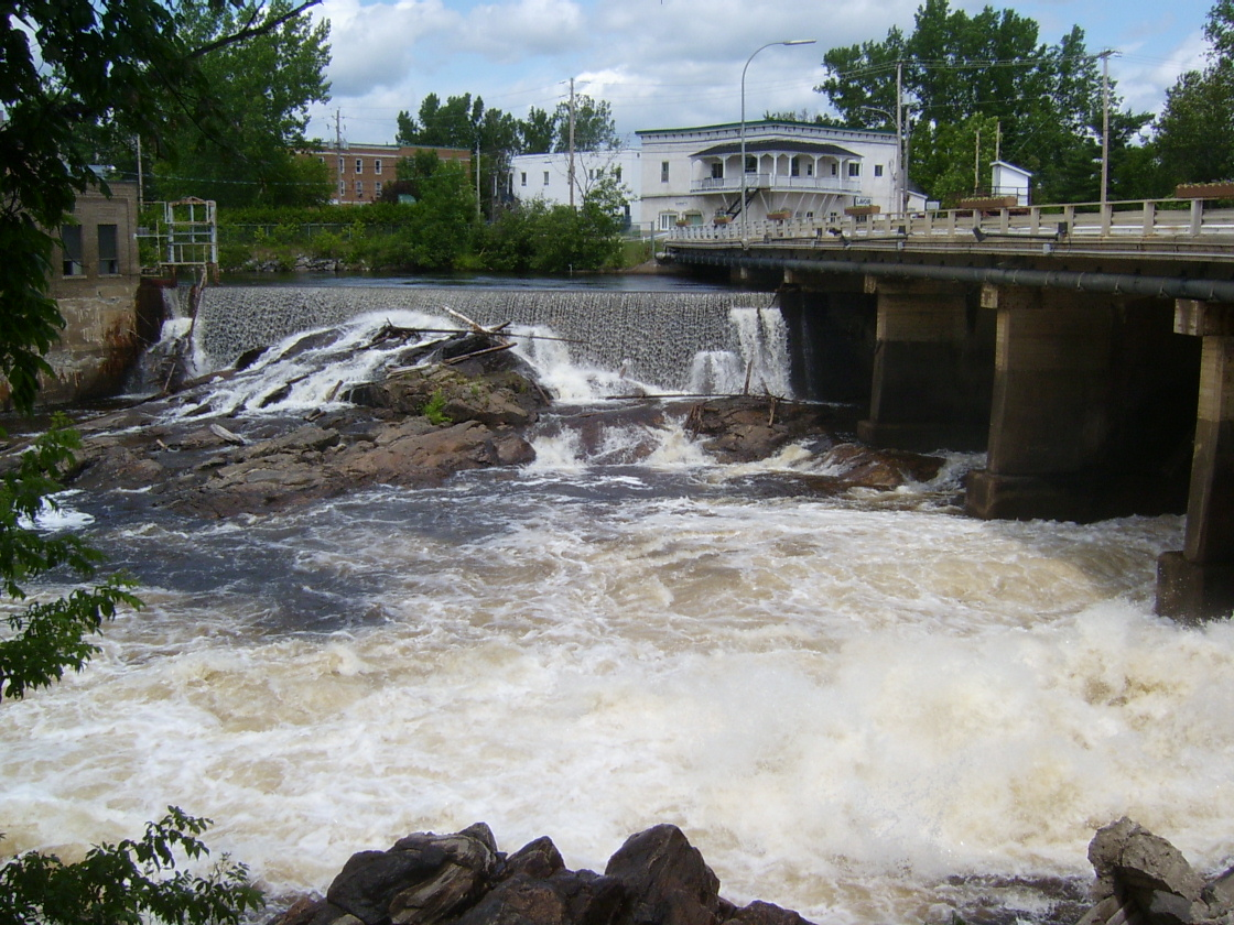 Barrage sur la rivière du Lièvre à Mont-Laurier (Québec, Canada)